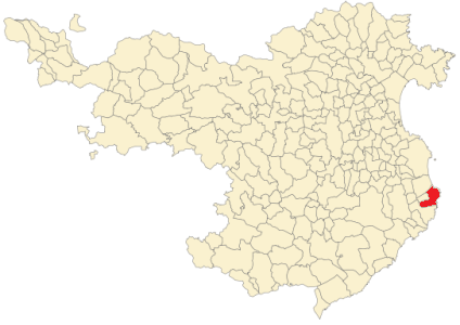 Begur